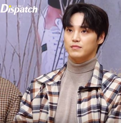 SBS 모비딕 숏폼 드라마 '농부사관학교2' 제작발표회가 12일 오후 서울 양천구 목동 SBS에서 열렸다.